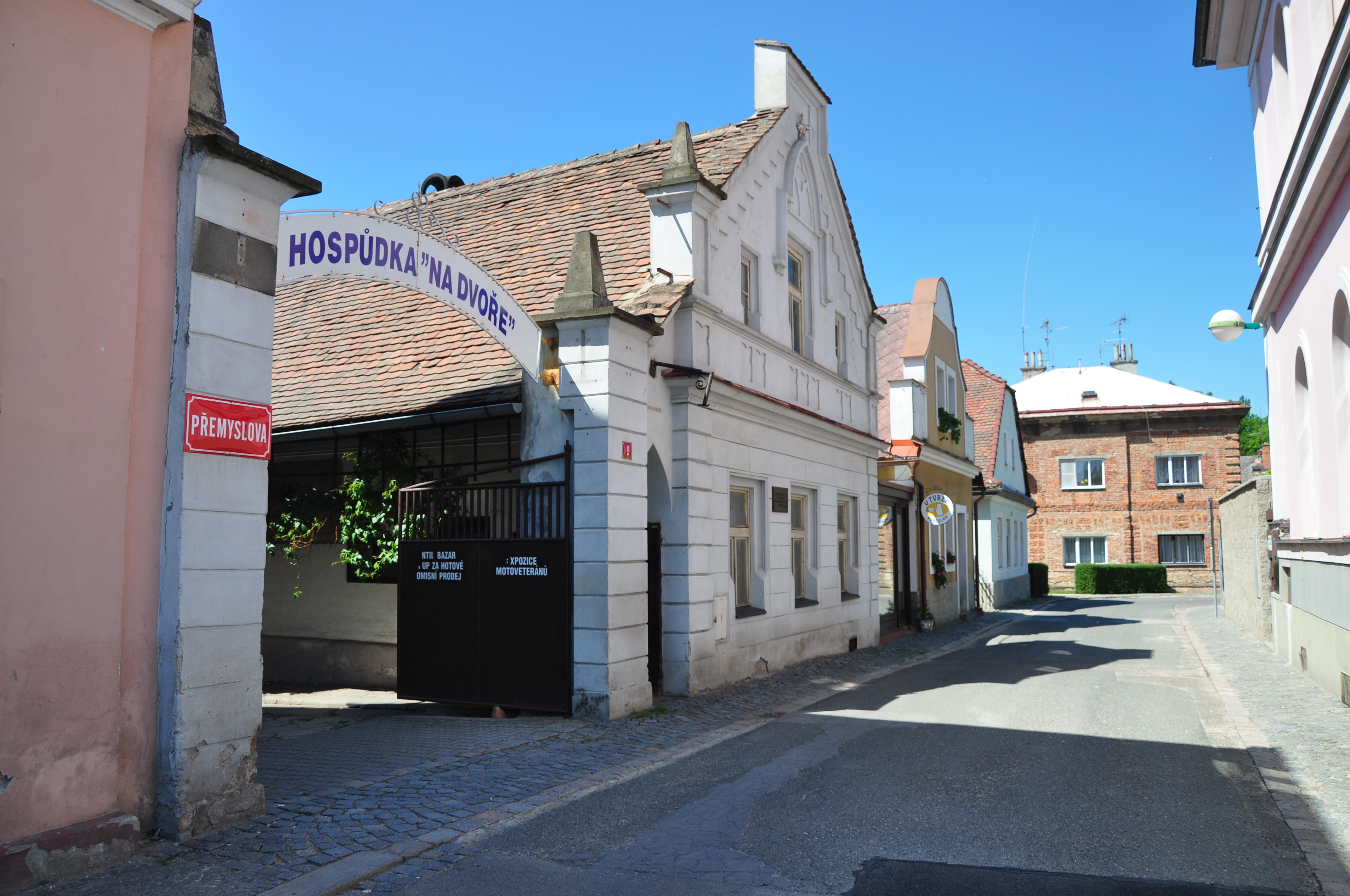 Třebechovice pod Orebem, dům č.p. 9, Přemyslova ulice, dům Josefa Probošta